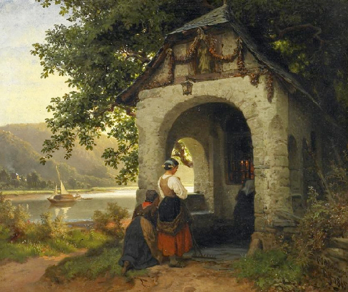 Andächtige Bäuerinnen vor kleiner Marienkapelle am Flußufer